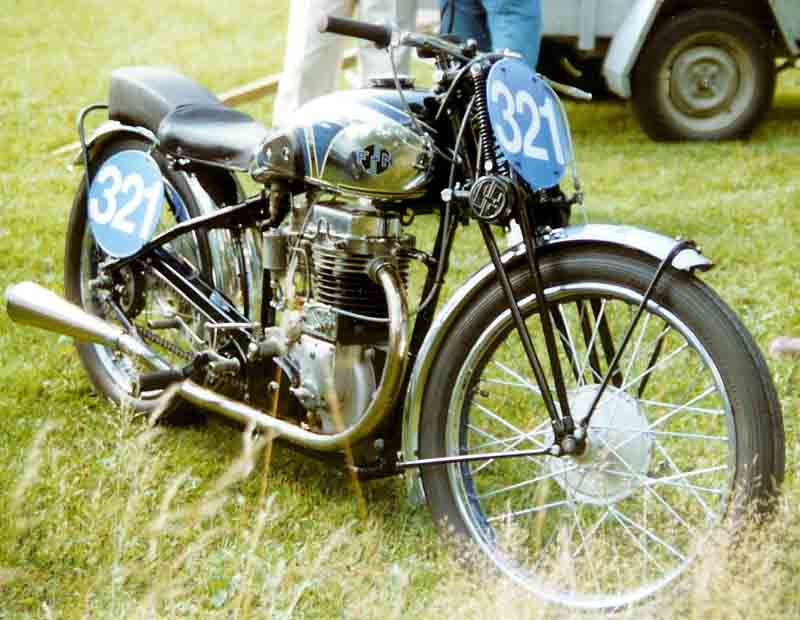 FN Racer